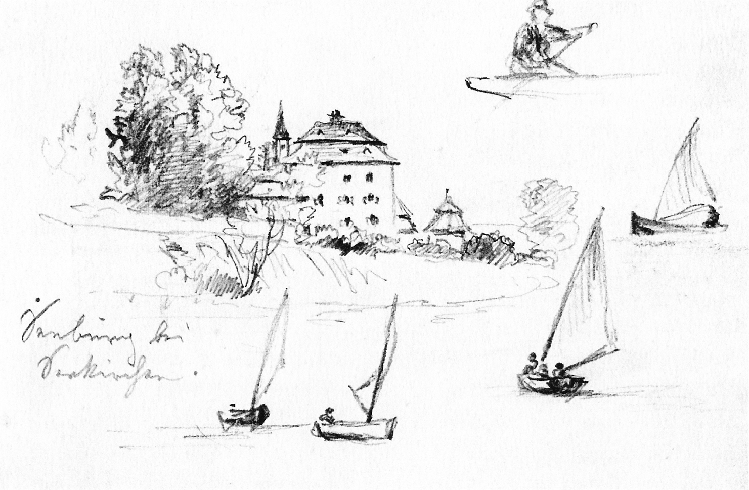 Seeburg bei Seekirchen, Bleistiftzeichnung aus einem Skizzenbuch von Anton Paul Heilmann